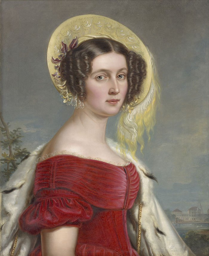 Thérèse de Saxe-Hildburghausen. Huile sur toile, v 1810. Exposée au château Nymphembourg, Munich